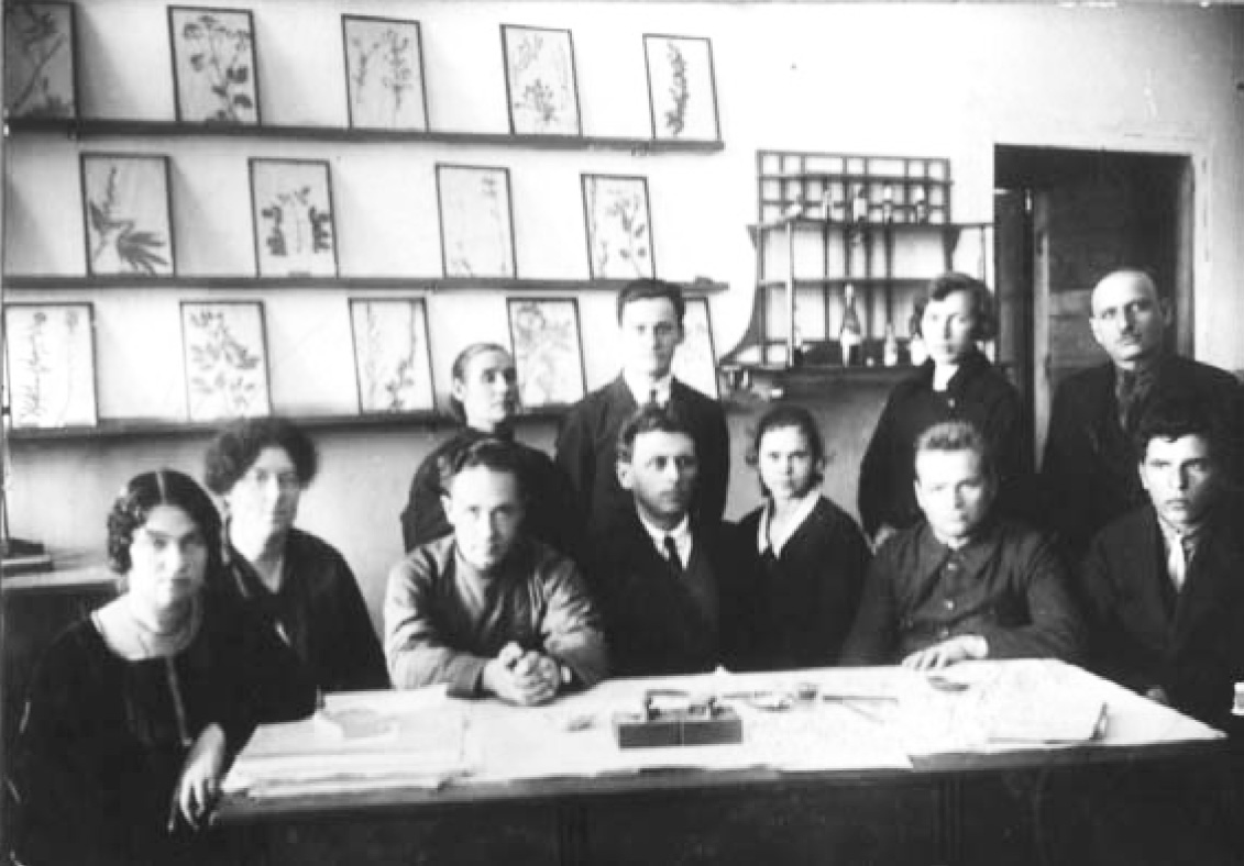 Николай Павлович Шавров (1884 — 1938) — советский фармаколог.